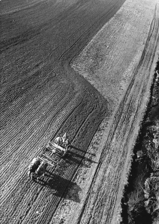 Pörsten, Frühjahrsbestellung Zentralbild Hillmer 4.3.1953 Frühjahrsbestellung in Pörsten bei Weissenfels.